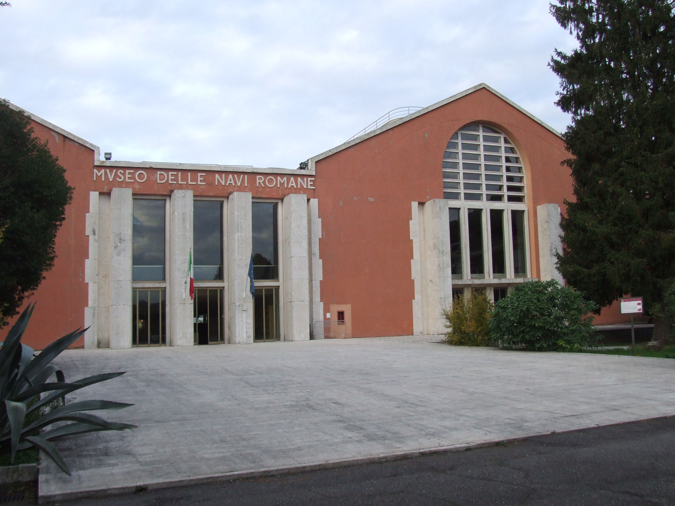 Museo delle Navi, Nemi, Roma